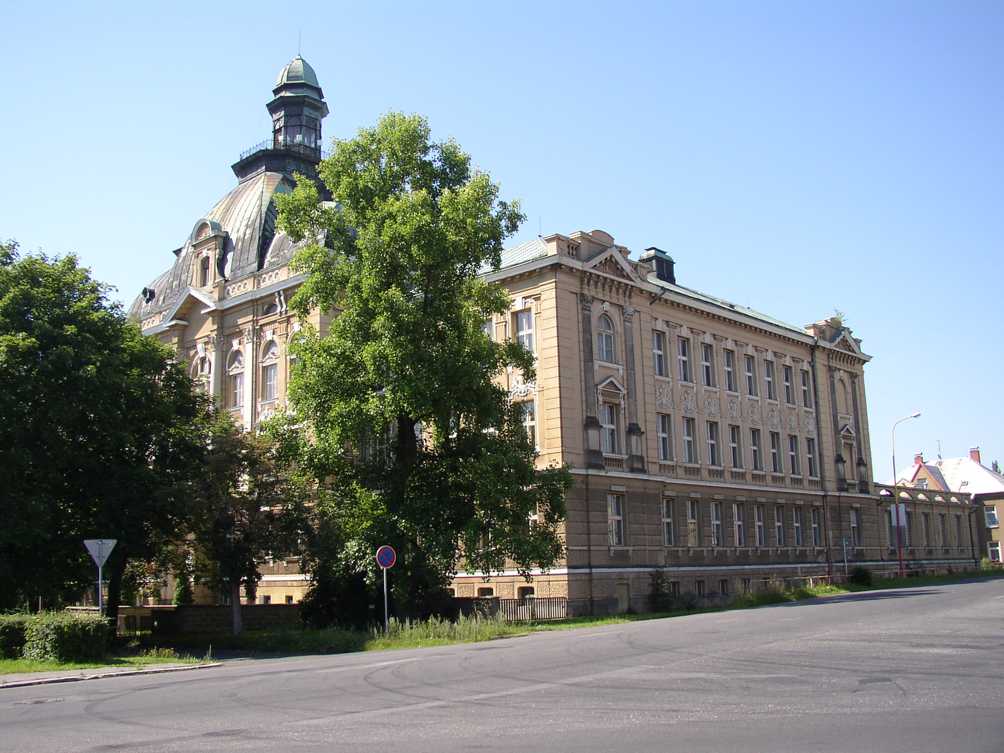 Biskupské gymnázium ve Varnsdorfu